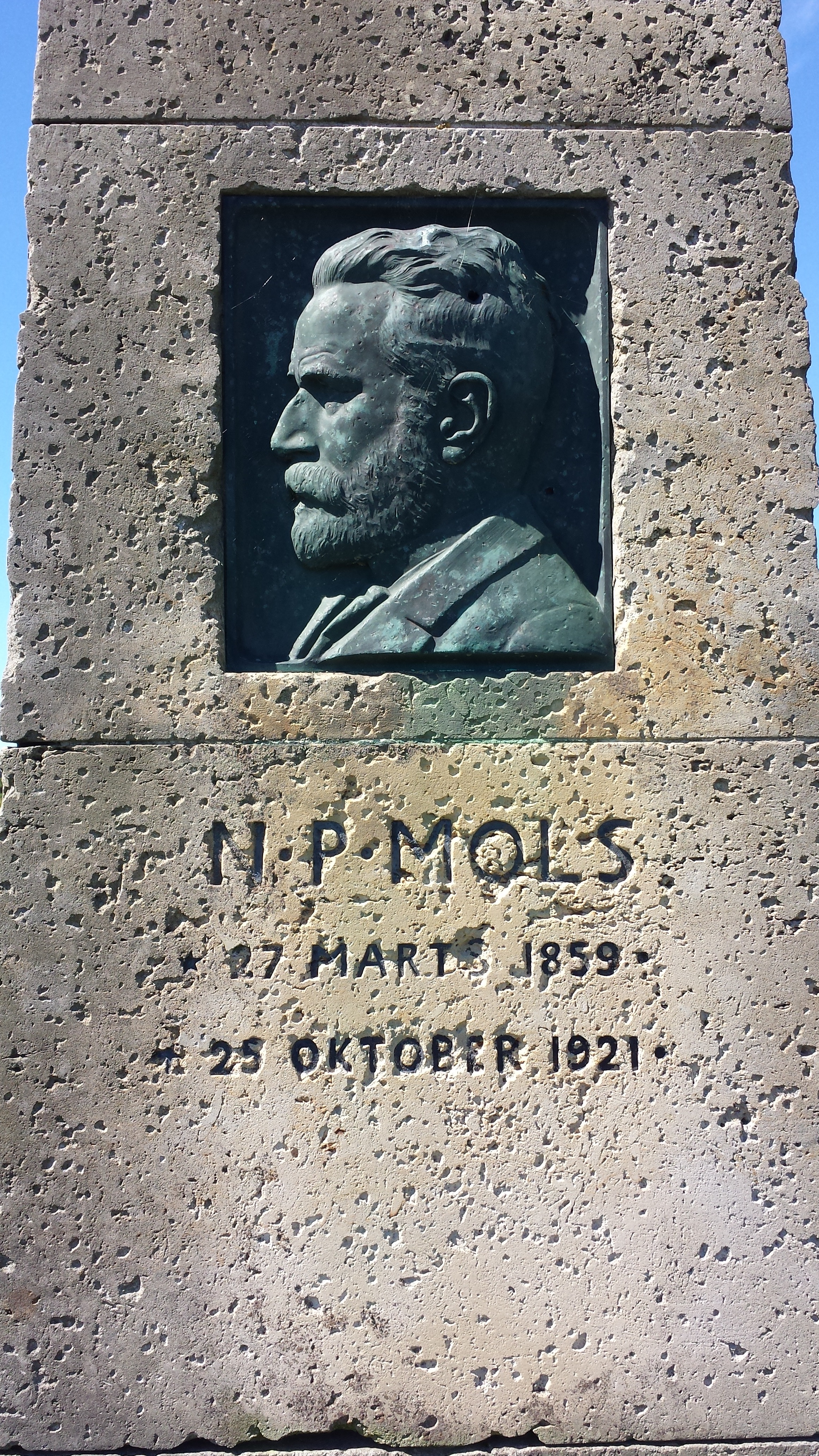 Denkmal für N.P. Mols (1859–1921; N.P. Mols in der dänischen Wikipedia) in Søndervig (Søndervig in der dänischen Wikipedia).